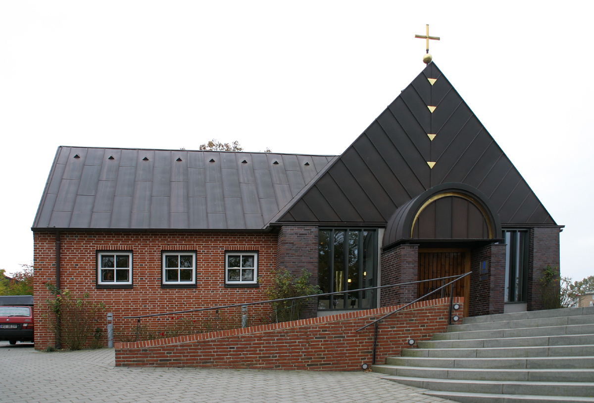 Evangelisch-lutherische Bartholomäuskirche von Boostedt